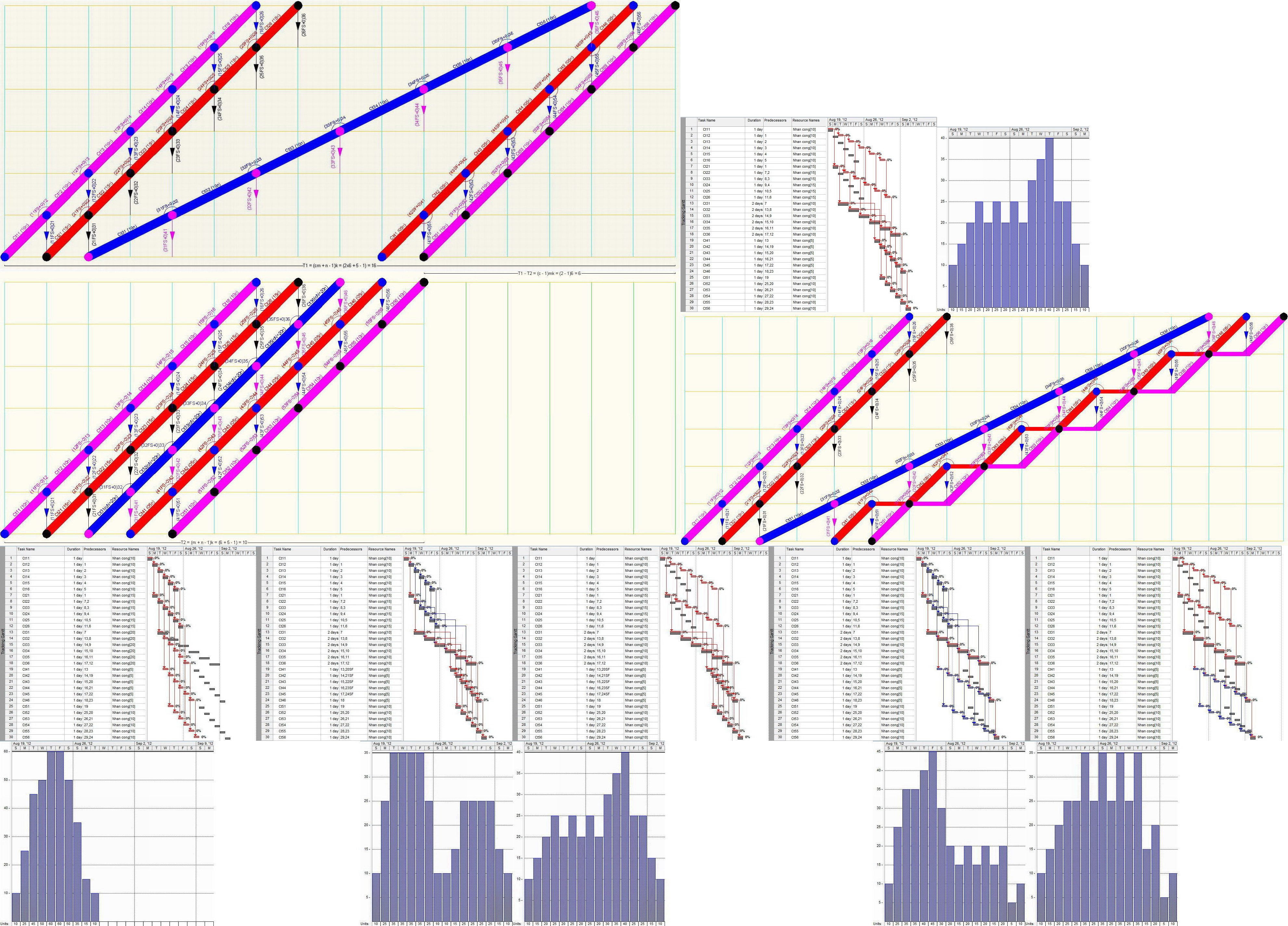 Hình vẽ mô tả việc biến đổi dây chuyền đơn nhịp bội số (còn gọi là cân bằng dây chuyền nhịp bội theo nhịp nhanh), trong tiến độ dây chuyền nhịp bội (nhịp nhanh), thành dây chuyền đơn cùng nhịp nhanh nhưng nguồn lực tăng lên bội số. Nhằm làm giảm tối đa thời lượng thực hiện toàn bộ dự án. Hình hoàn toàn do tôi sáng tạo ra, qua việc vẽ trên AutoCAD 2010, chụp ảnh màn hình, và sửa đổi trên ACD FotoCanvas 3.0 cùng Paint.